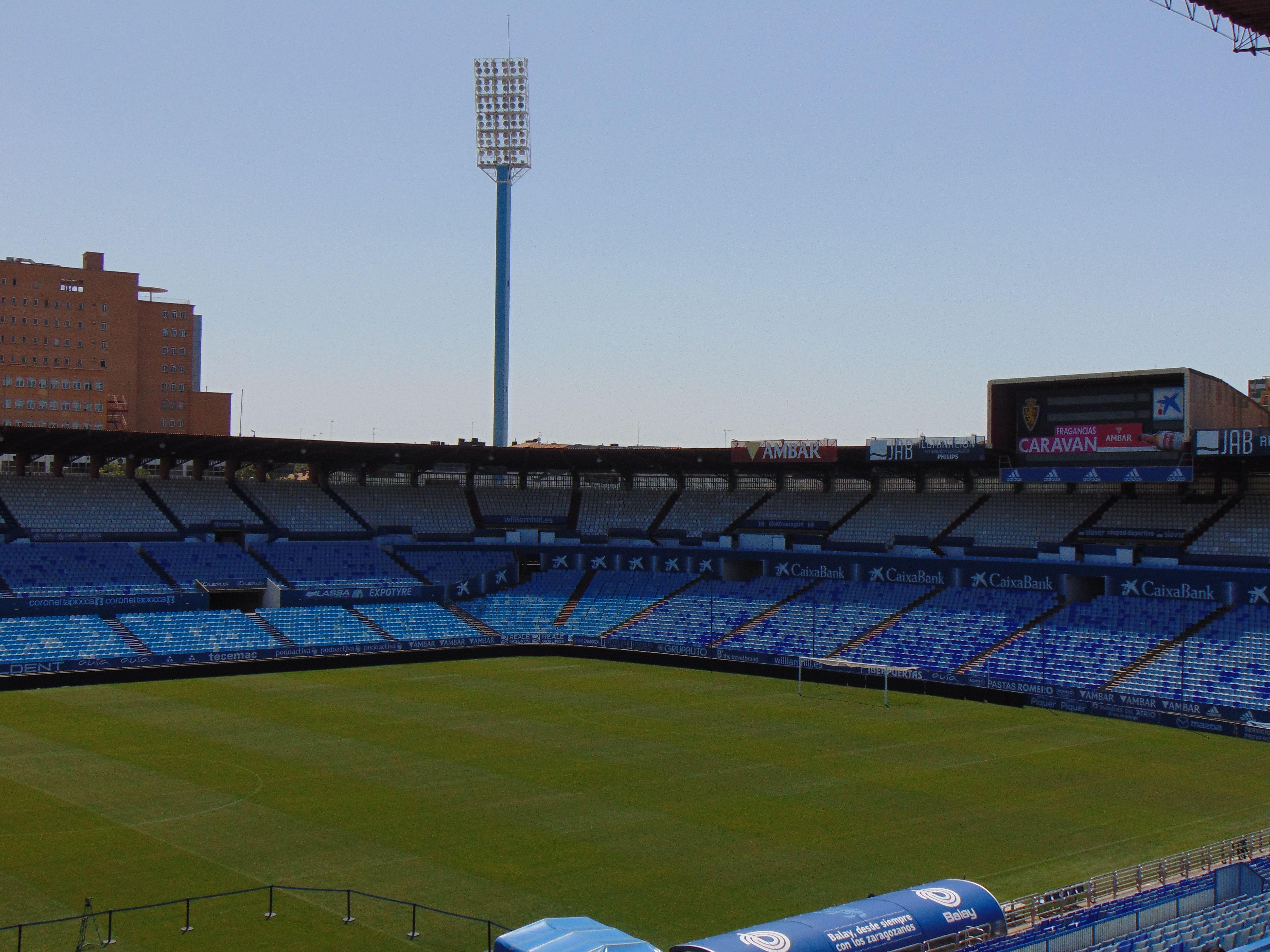 Grada Sur del estadio municipal de La Romareda (Zaragoza).